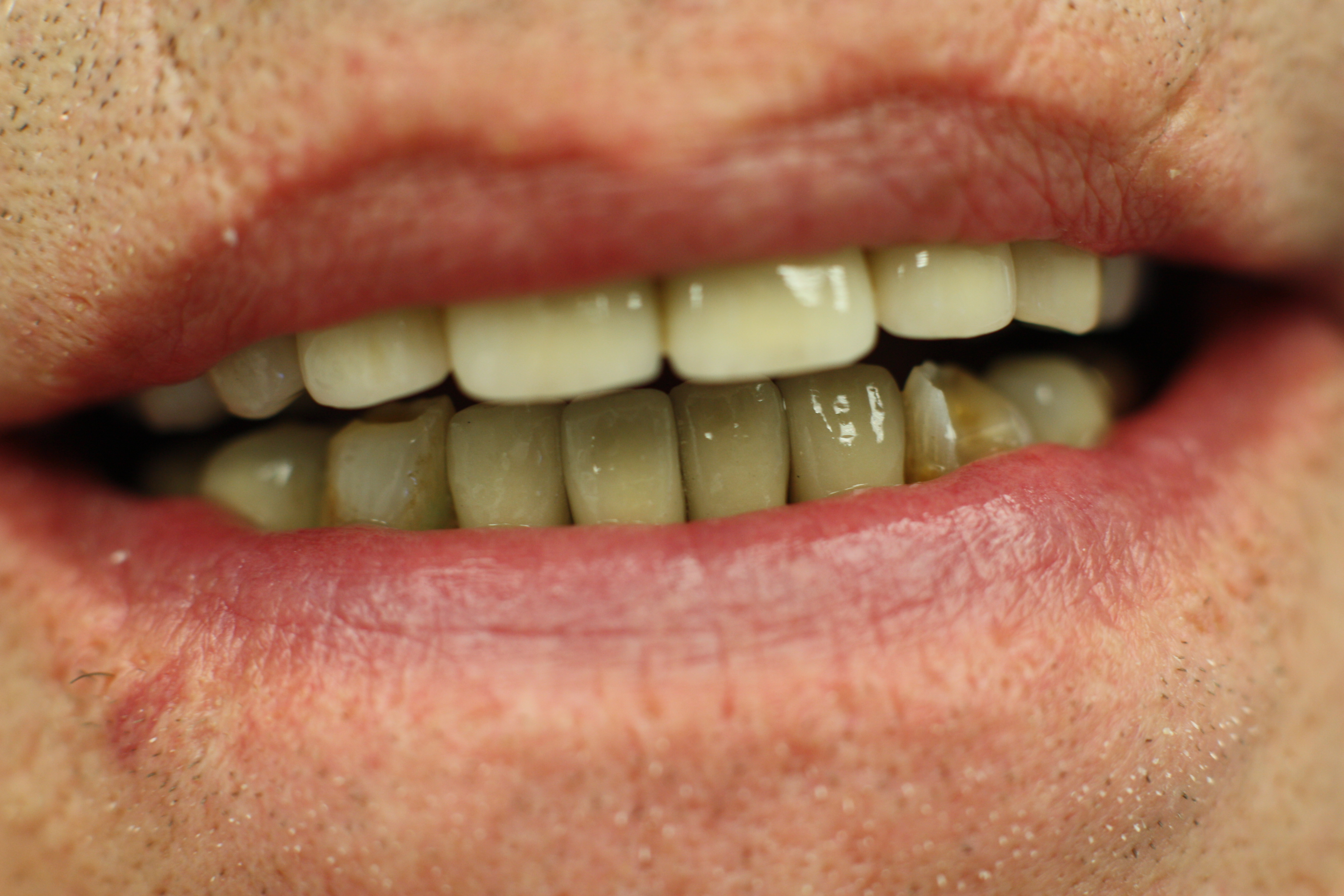 Frontzahnkronen Unterkiefer, VMK